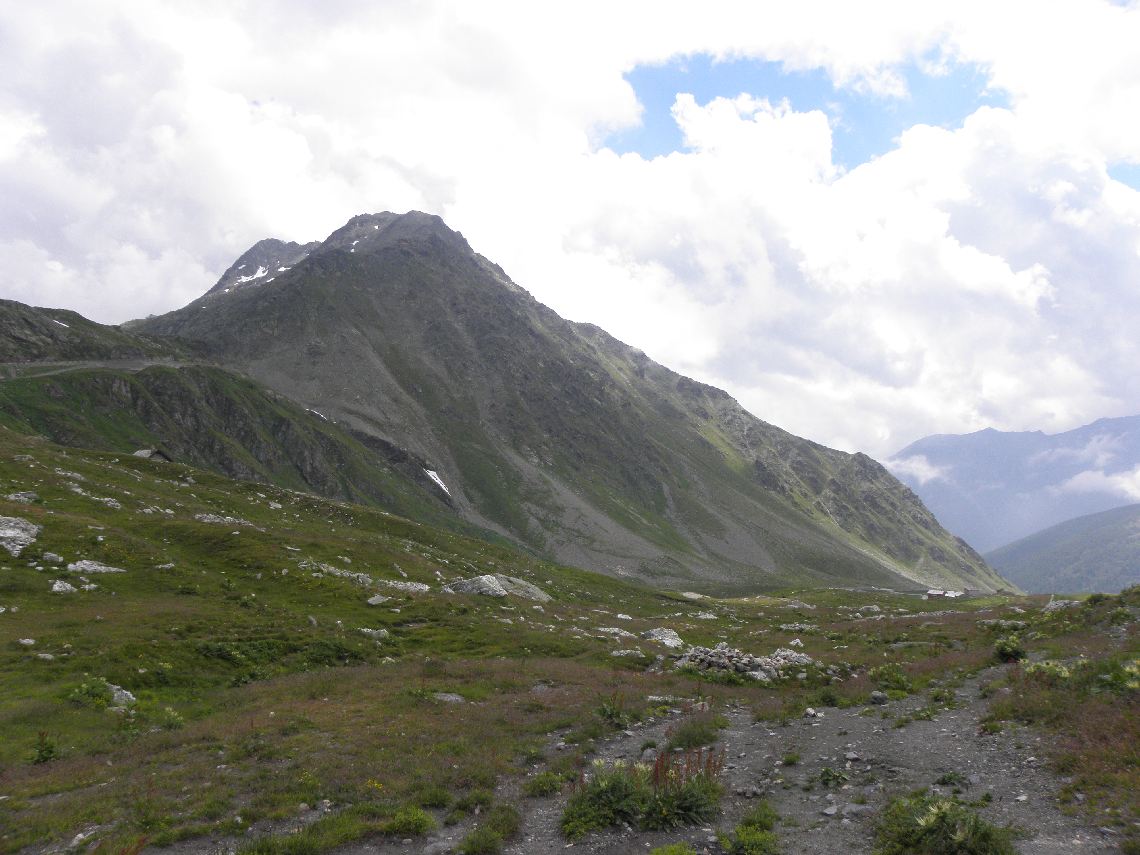 Italienische Seite des Grossen Sankt Bernhard (2469m), aufgenommen vom Straßenrand.